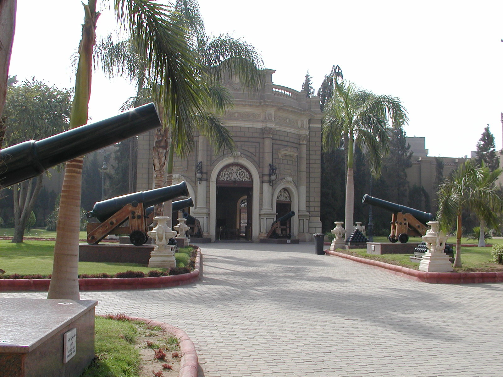 Vue depuis le jardin de l'entrée du Musée du Palais d'Abedin, Le Caire, Égypte.